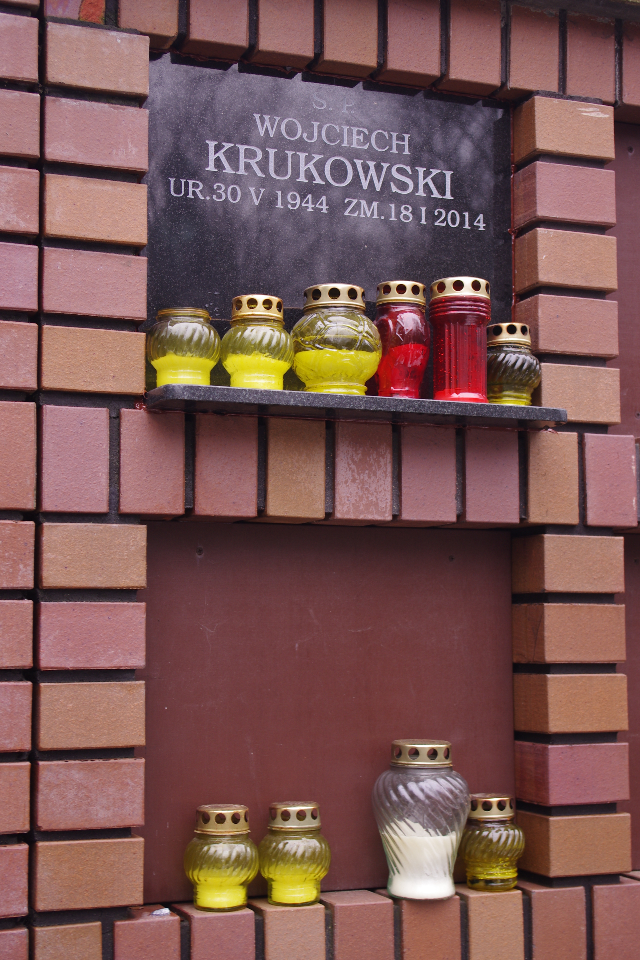 Grób historyka sztuki Wojciecha Krukowskiego na Starych Powązkach w Warszawie